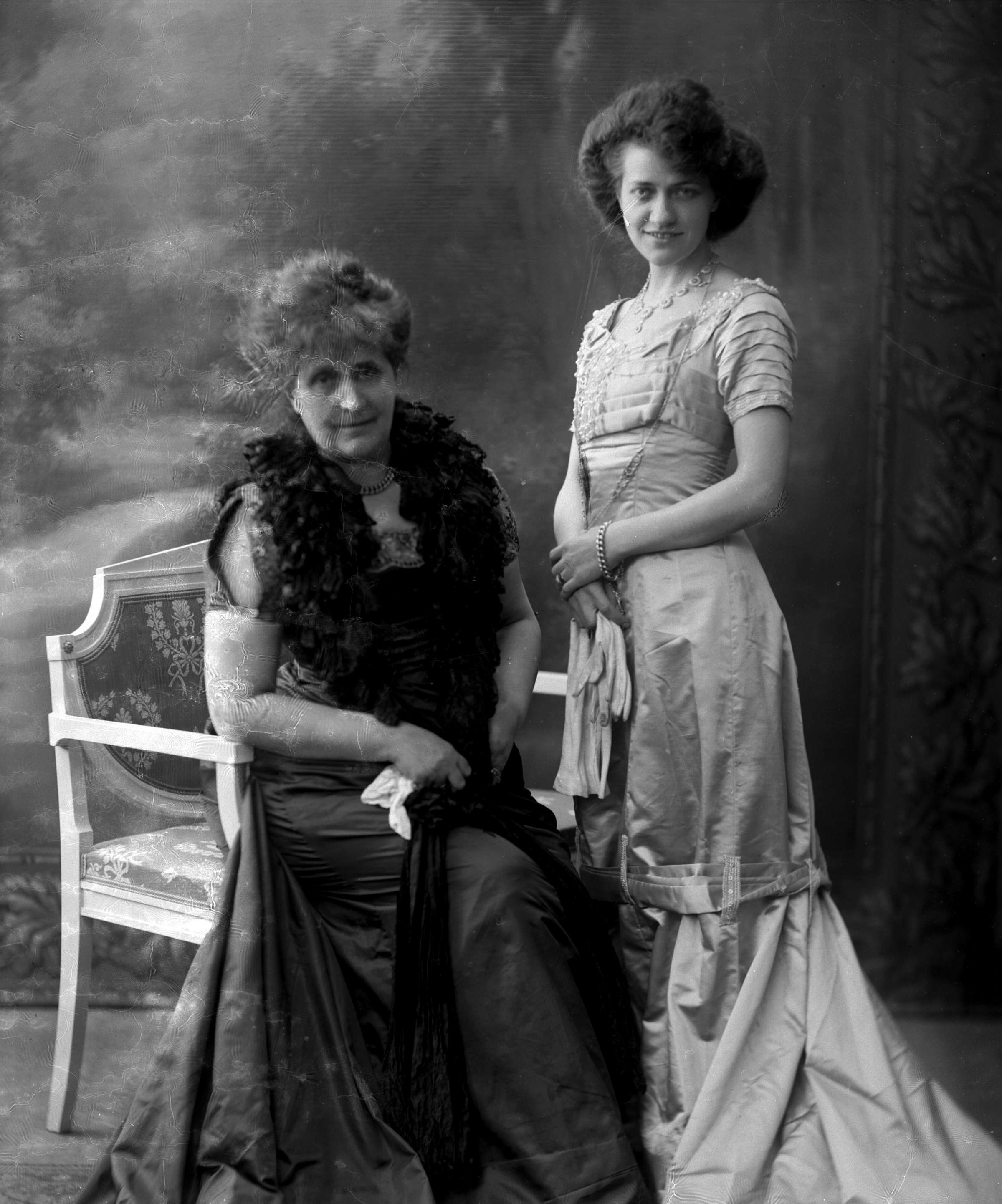 Skuespilleren og forfatteren Ågot Gjems Selmer og hennes datter, sangerinnen Tordis Gjems Selmer, fotografert av Gustav Borgen i 1911.